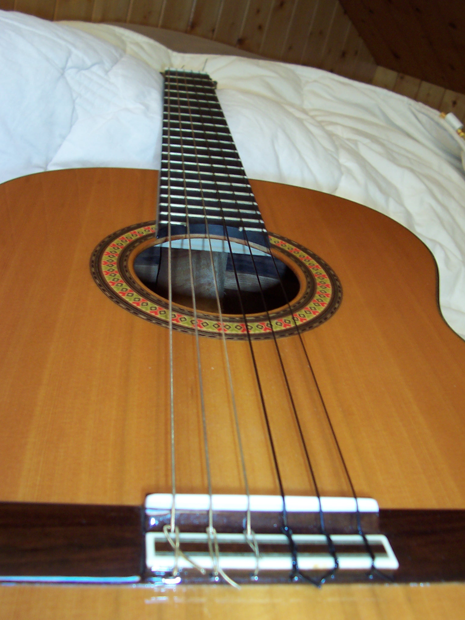 Une guitare de marque Cuenca (artisans travaillant dans la ville de Cuenca en Espagne)